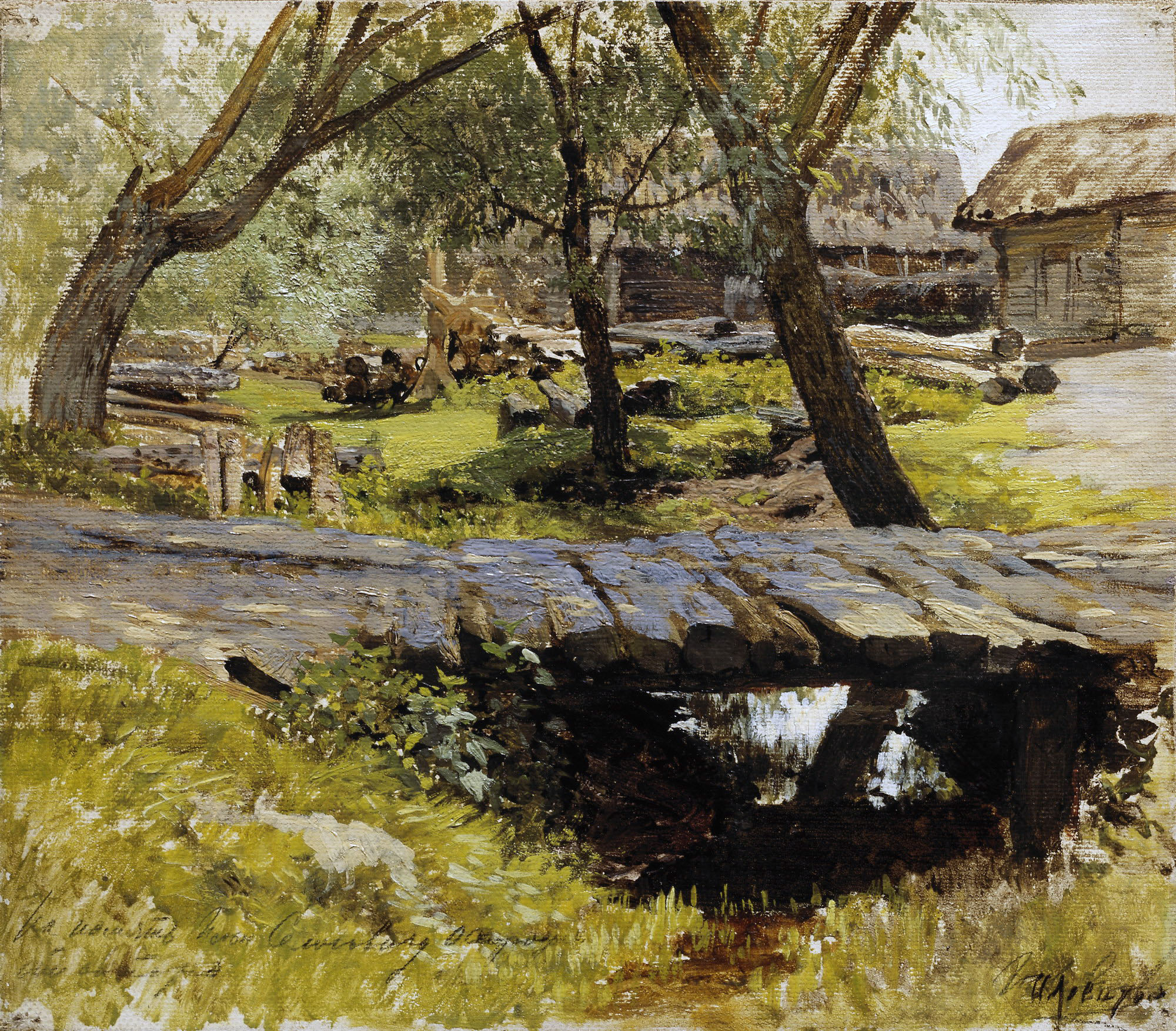 Bridge. Savvinskaya sloboda near Zvenigorod. Picture of Isaak Levitan Исаак Левитан. "Мостик. Саввинская слобода". 1884.